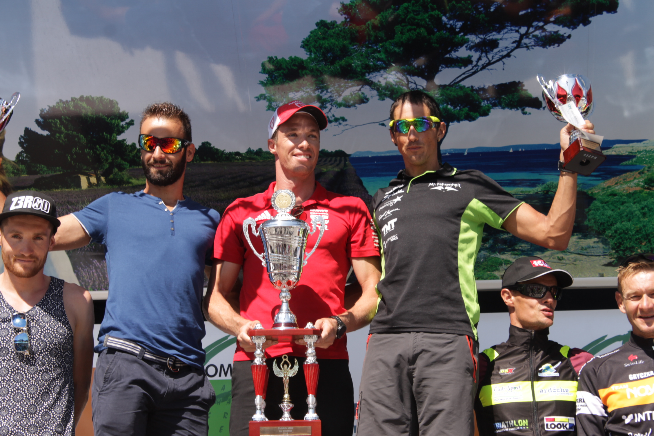 Embrunman 2016. GàD, Étienne Diemunsch, Andrej Vistica, James Cunnama, Gustavo Rodriguez, Thibaut Humbert